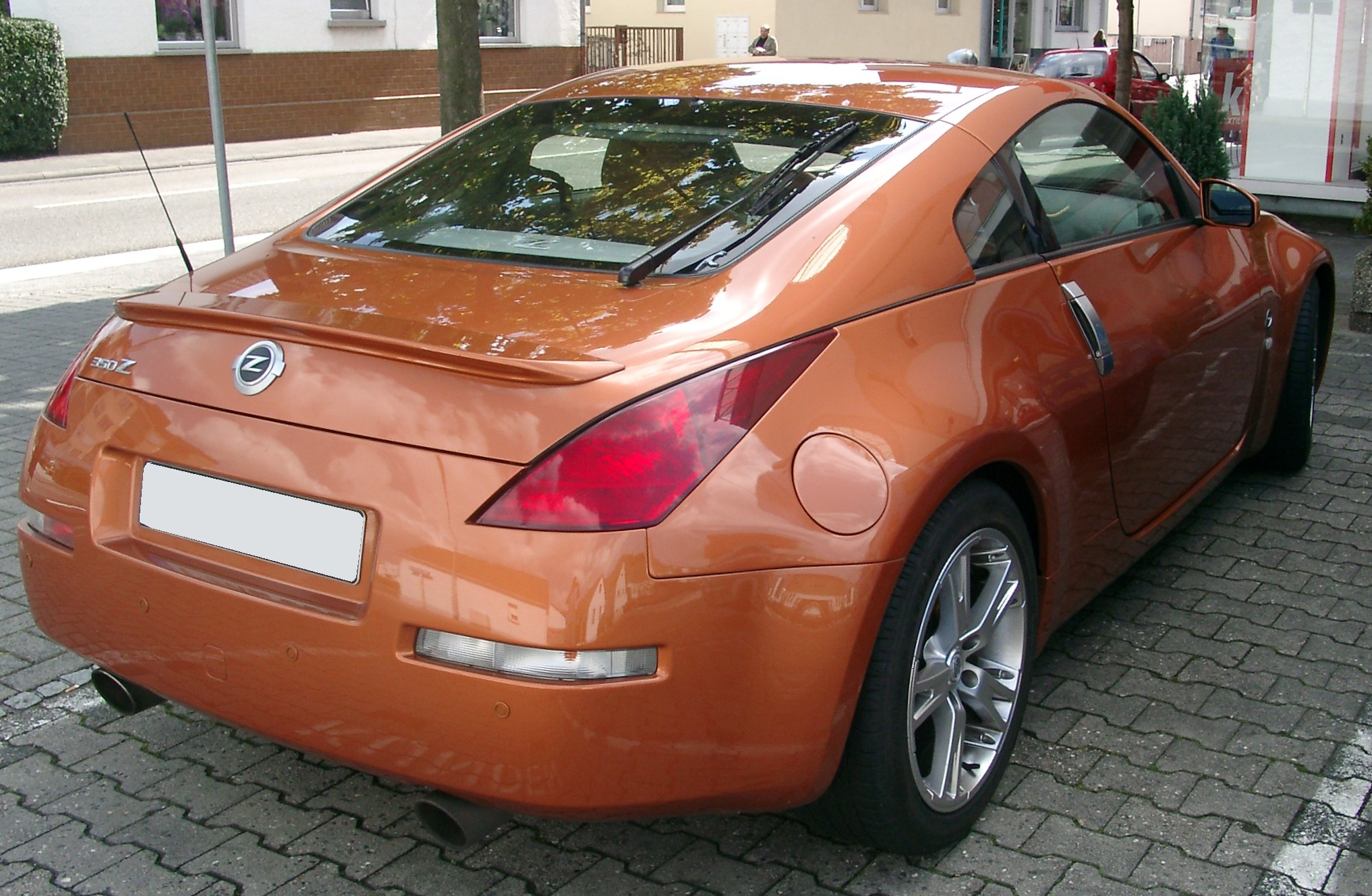 Nissan 350Z